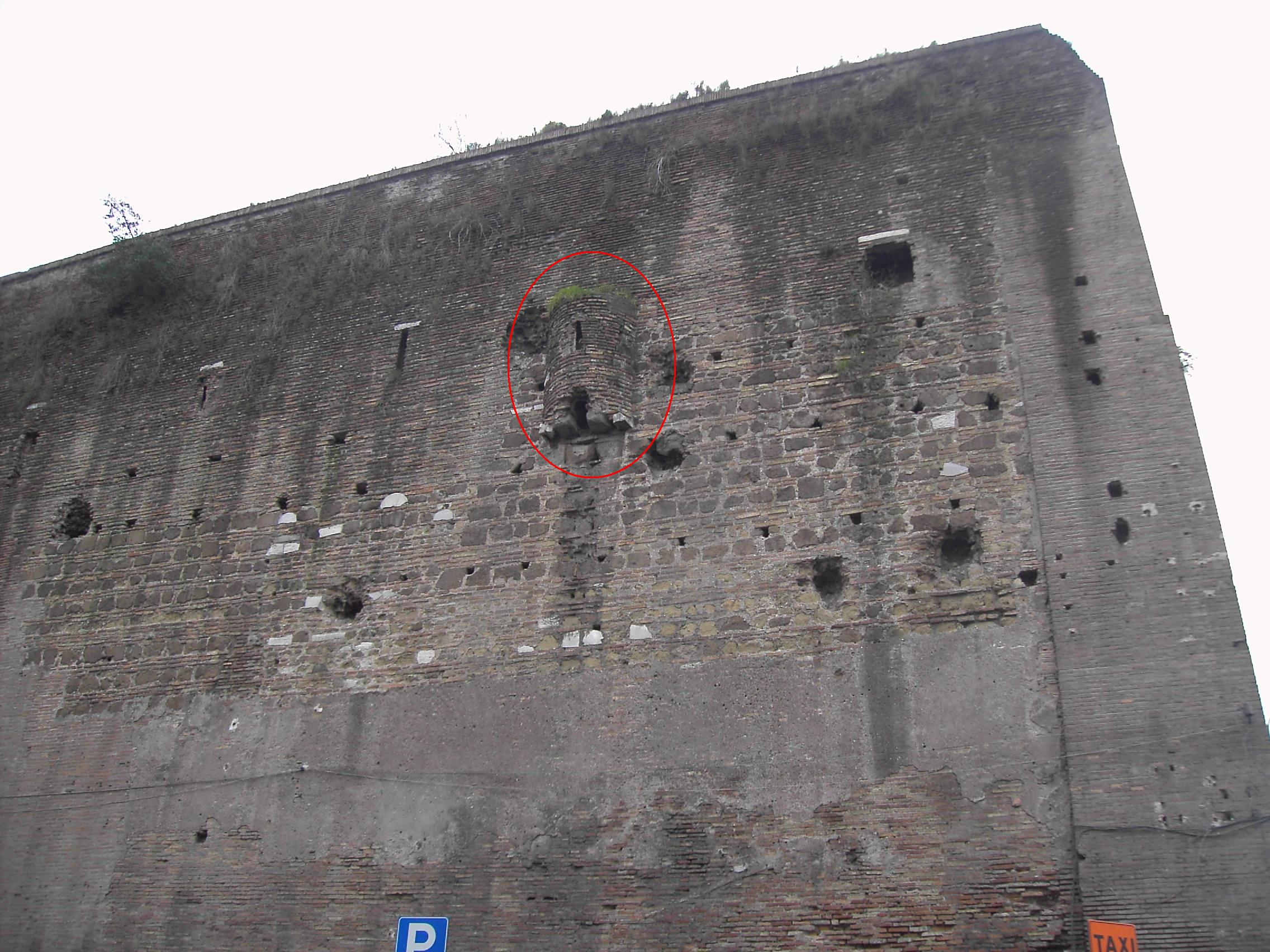 Roma , piazza Fiume: latrina nelle mura Aureliane presso Porta Salaria